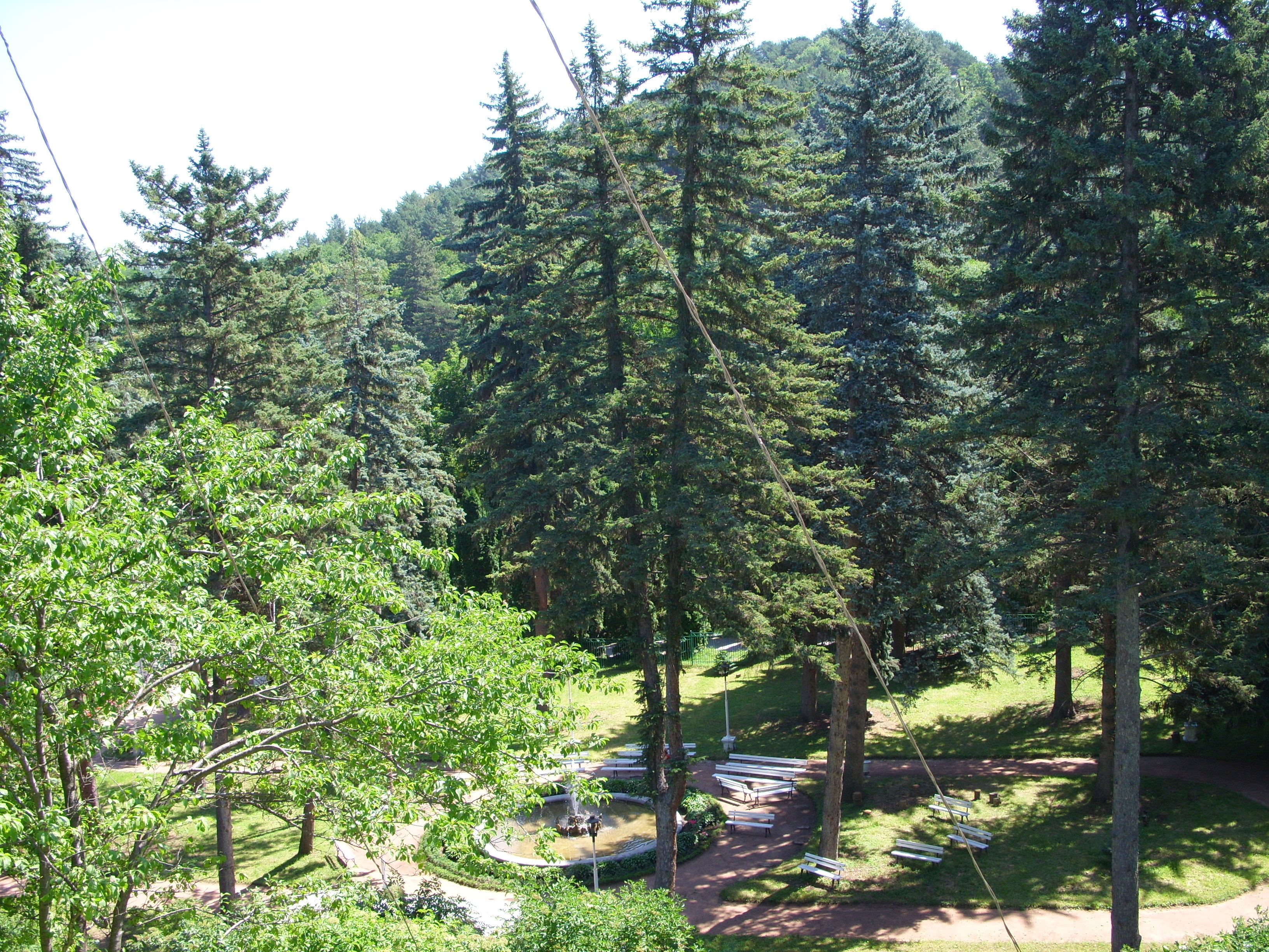 Мемориальный музей-усадьба художника Н. А. Ярошенко, г. Кисловодск. Неофициальное краткое название - «белая вилла».